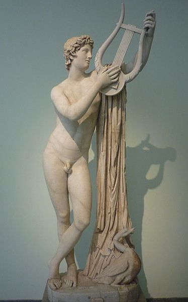 Statue de Pothos, Musée archéologique de Naples, Italie